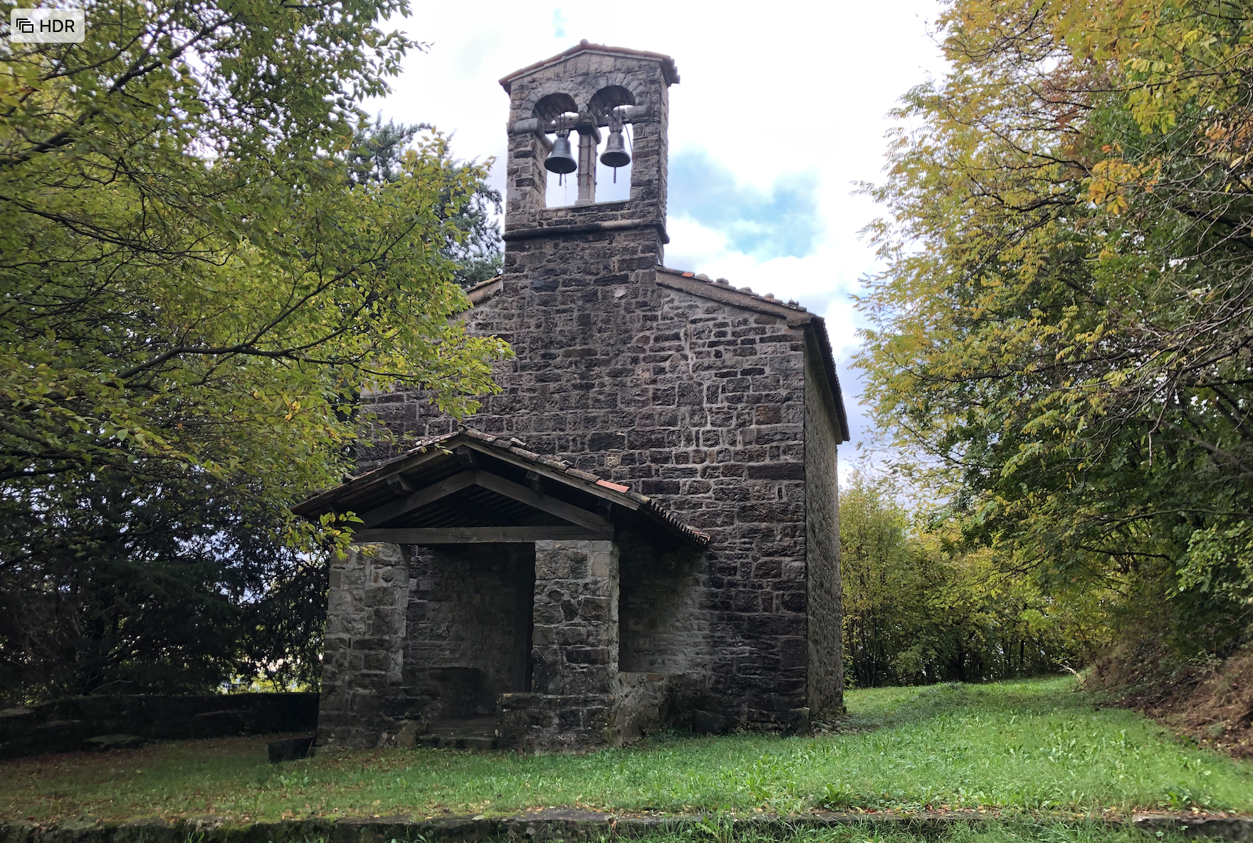 Castello di Soffumbergo - Chiesa